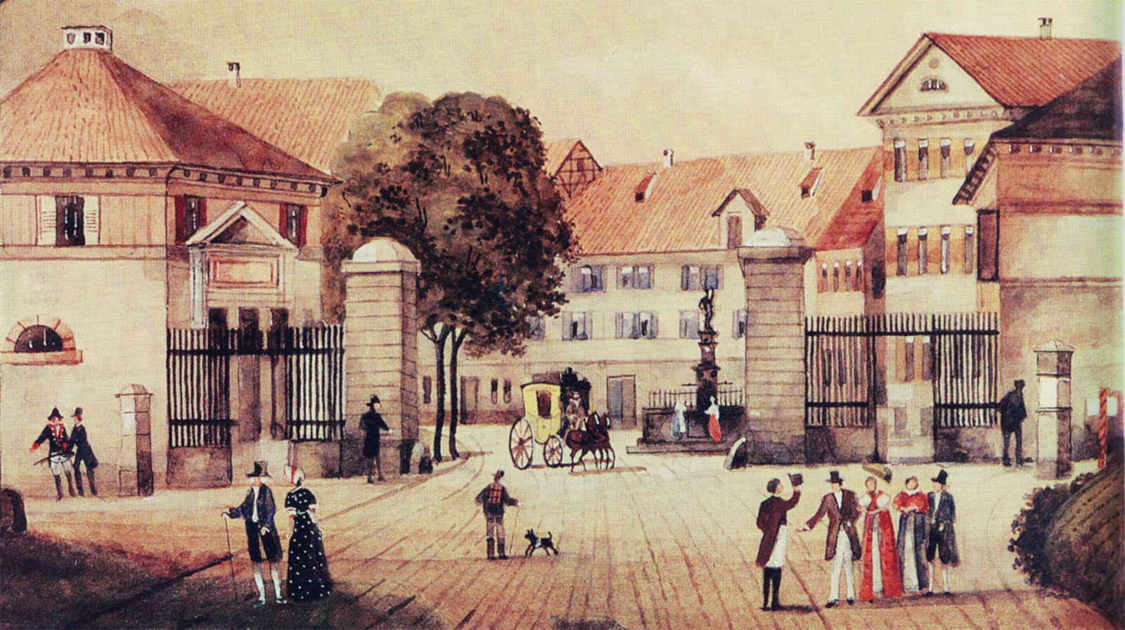 Gouchemalerei des Fleinertor